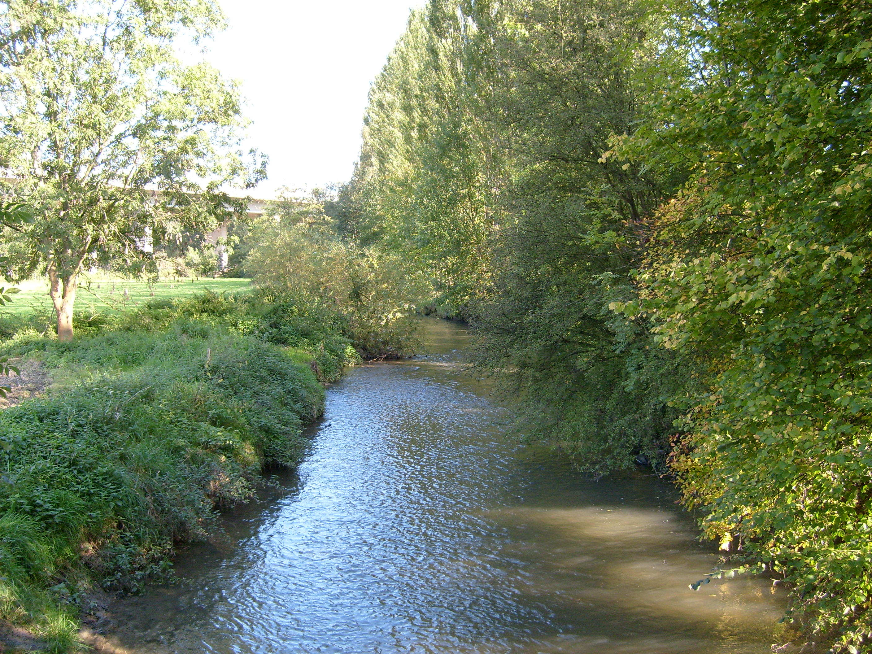 Die Düssel aus dem Neandertal kommend in Erkrath